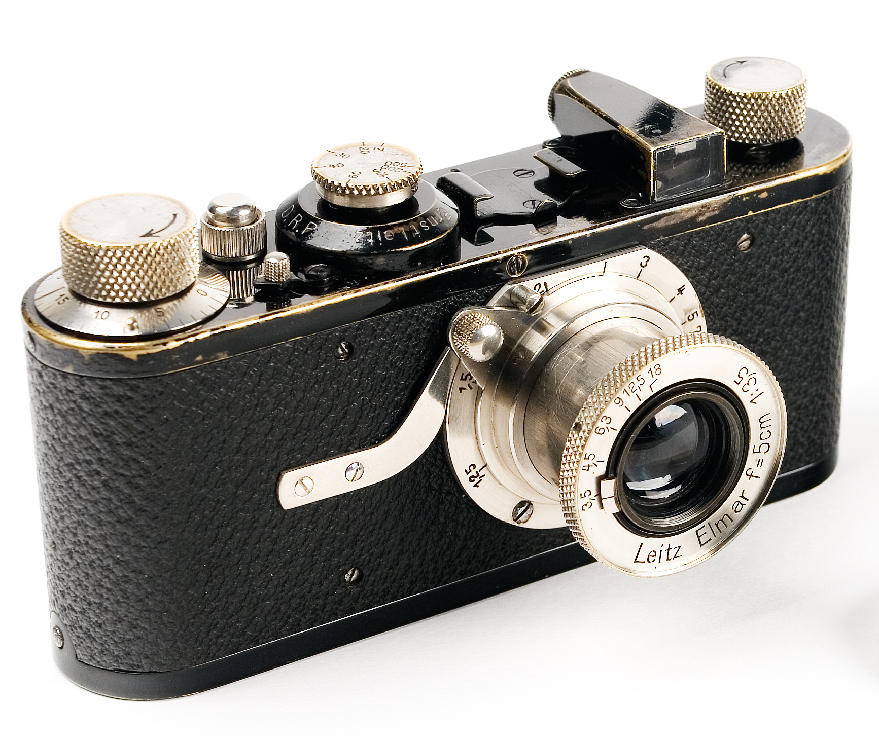 Leica I (A) Erste „Schraubleica“-Serie mit fest montiertem Objektiv Leitz Elmar f = 5 cm 1 : 3,5 (1929 oder 1930)